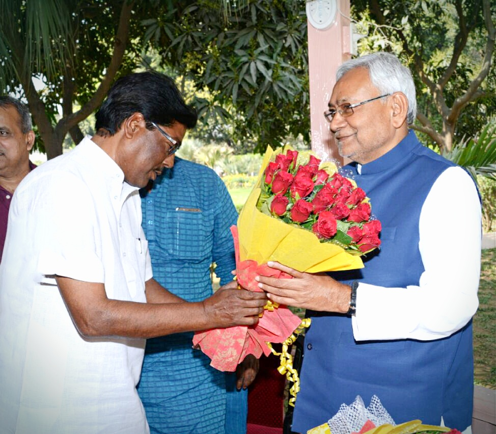 इस तस्वीर में जदयू के नेता सुमन कुमार मल्लिक मल्लिक जी बिहार के मुख्यमंत्री श्री नीतीश कुमार जी का अभिवादन करते हुए ।